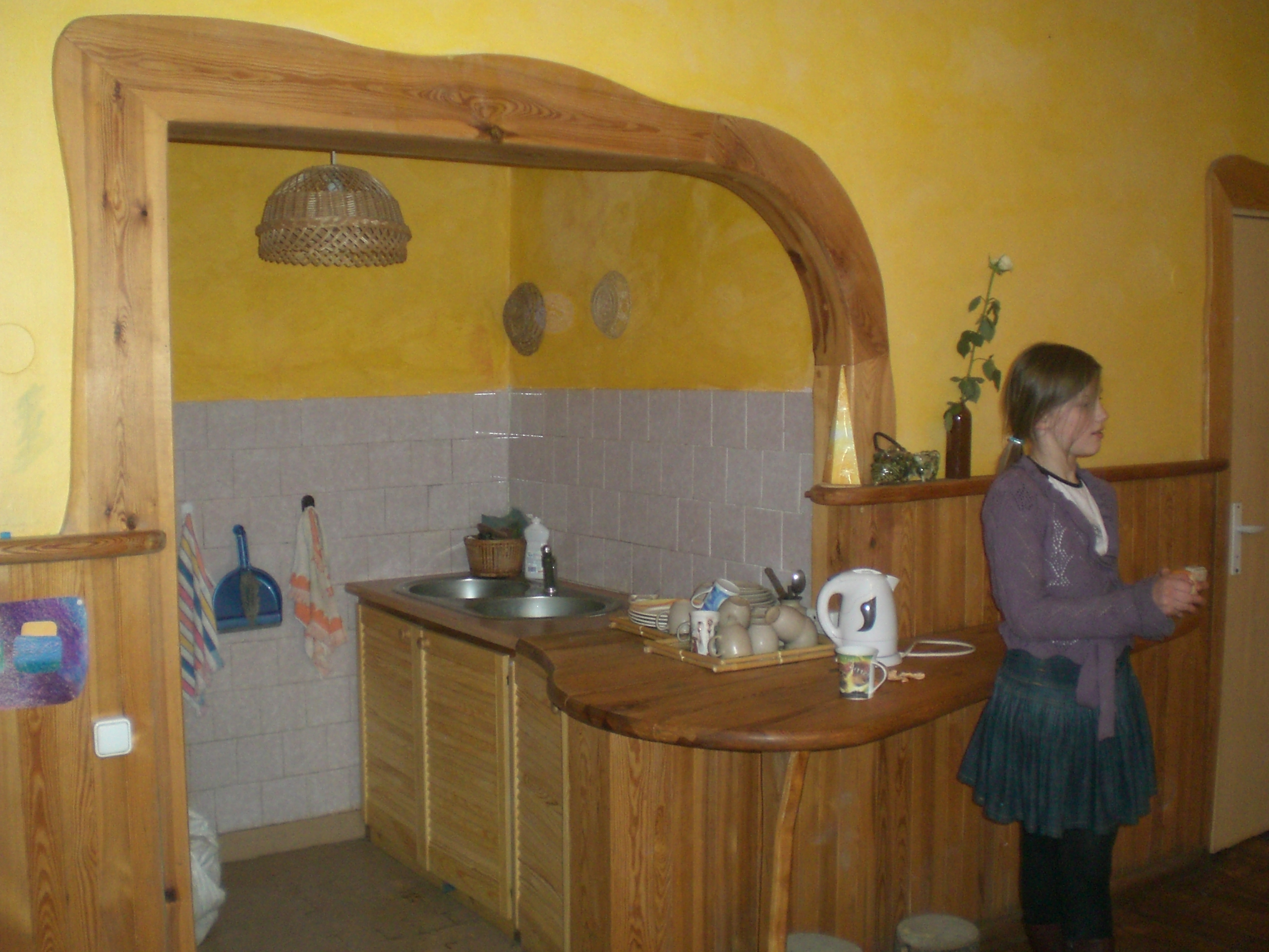 kuireja angulo en la 4-a klaso de valdorfa lernejo en Kaŭno (Litovio) Fonto: propra foto